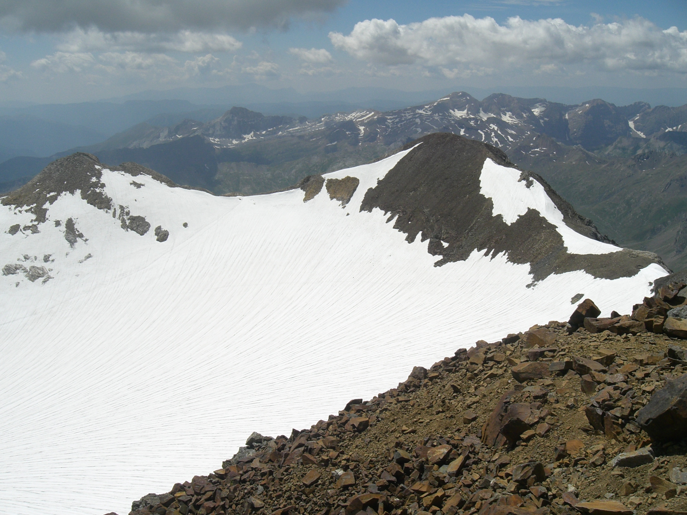 Vue du pic Central(à gauche) et du pic de Cerbillona (à droite)